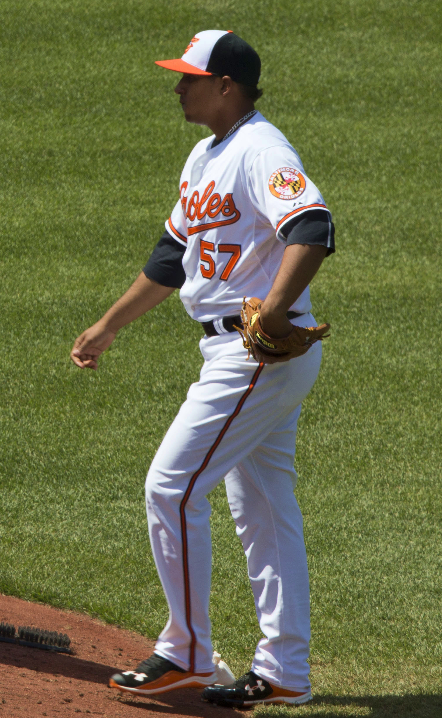 Jorge Rondón